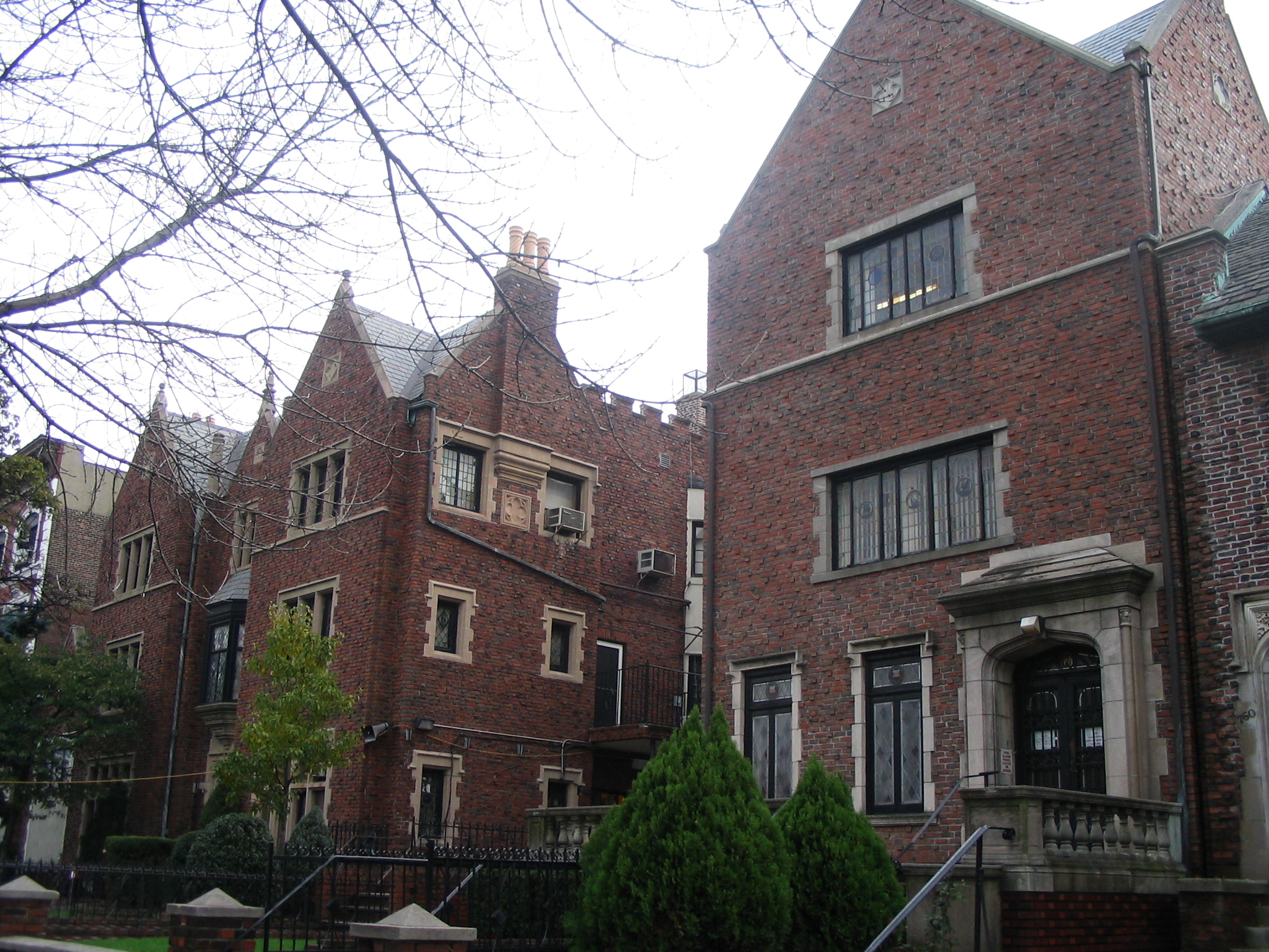 ספריית אגודת חסידי חב"ד העולמית. ממוקמת מימין לhe:מרכז חב"ד העולמי - 770. מצד שמאל של הבניין נראה מרכז חב"ד.